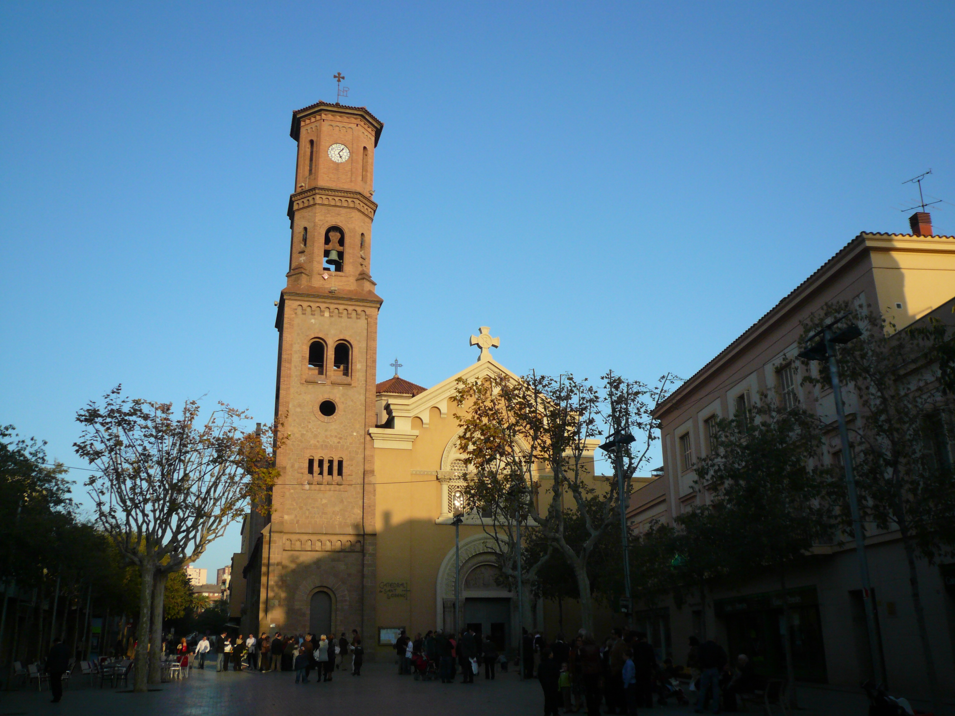 Parròquia de Sant Llorenç, ara catedral de Sant Feliu de Llobregat Object location41° 22′ 50.87″ N, 2° 02′ 45.7″ E